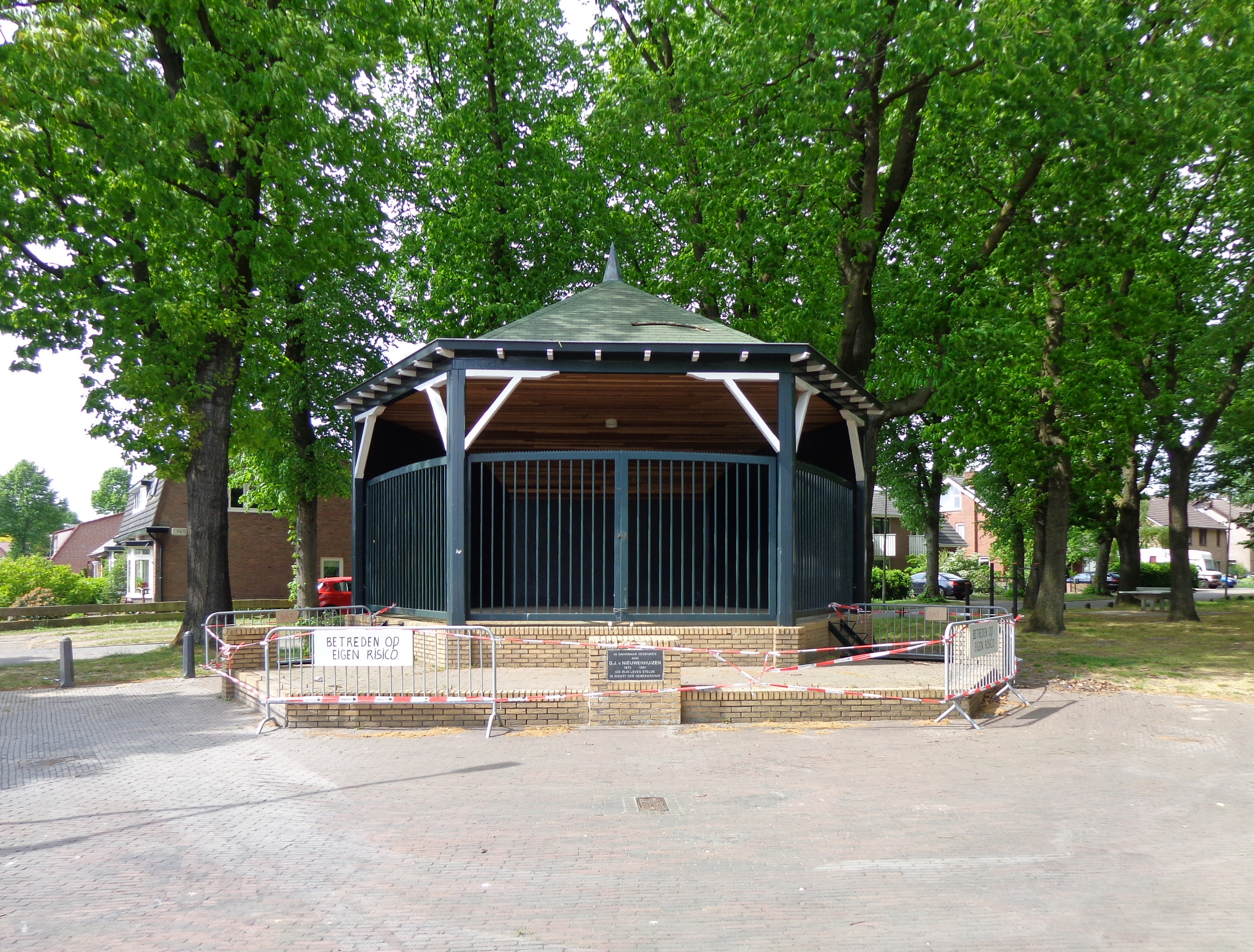 Muziektent in Austerlitz